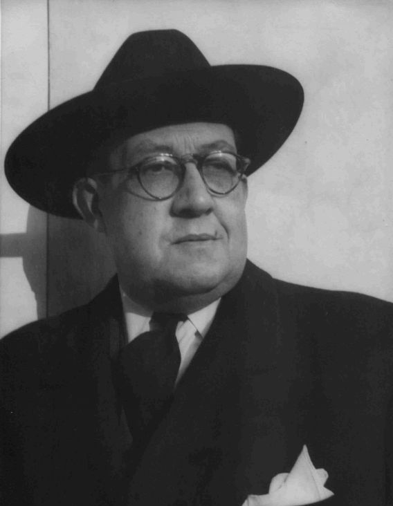 El escritor chileno Alberto Romero; fue uno de los fundadores de la Sociedad de Escritores, que llegó a presidir (1938-40 y 1947-49).